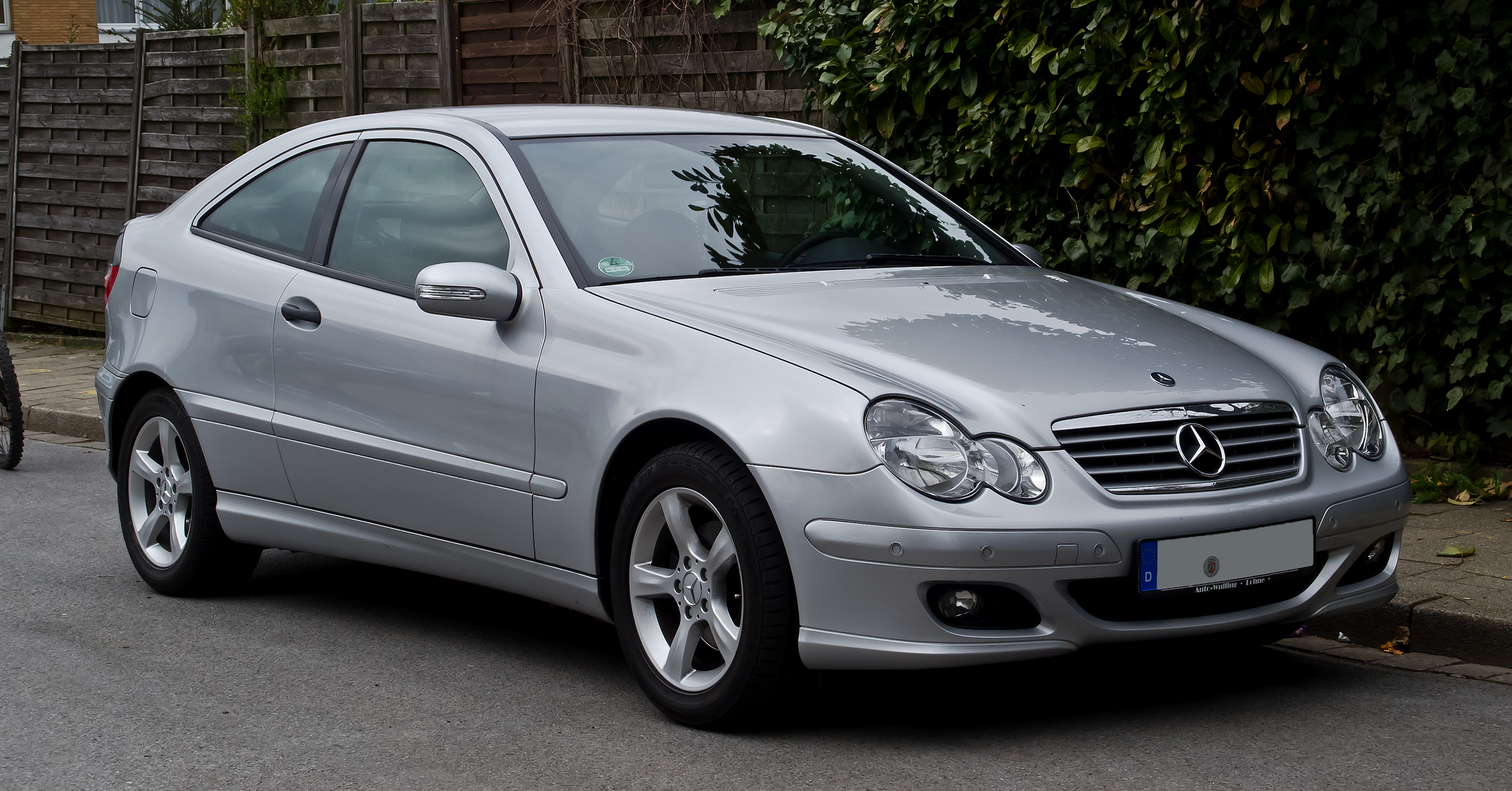 Mercedes-Benz C 180 Kompressor Sportcoupé (CL 203, Facelift)